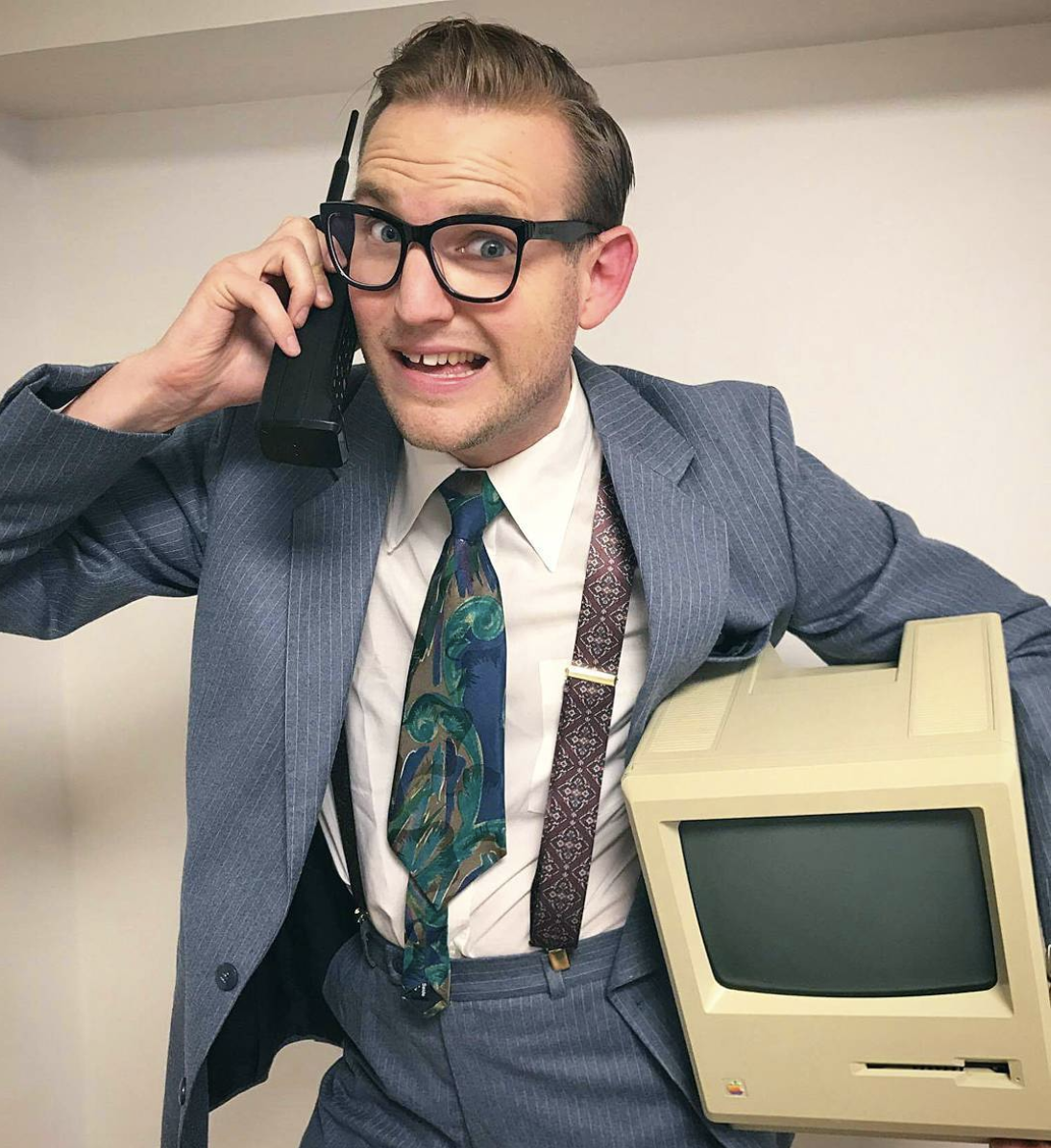 Emil Norberg i karaktär under inspelning av Norbergs TV-tablå (2018)